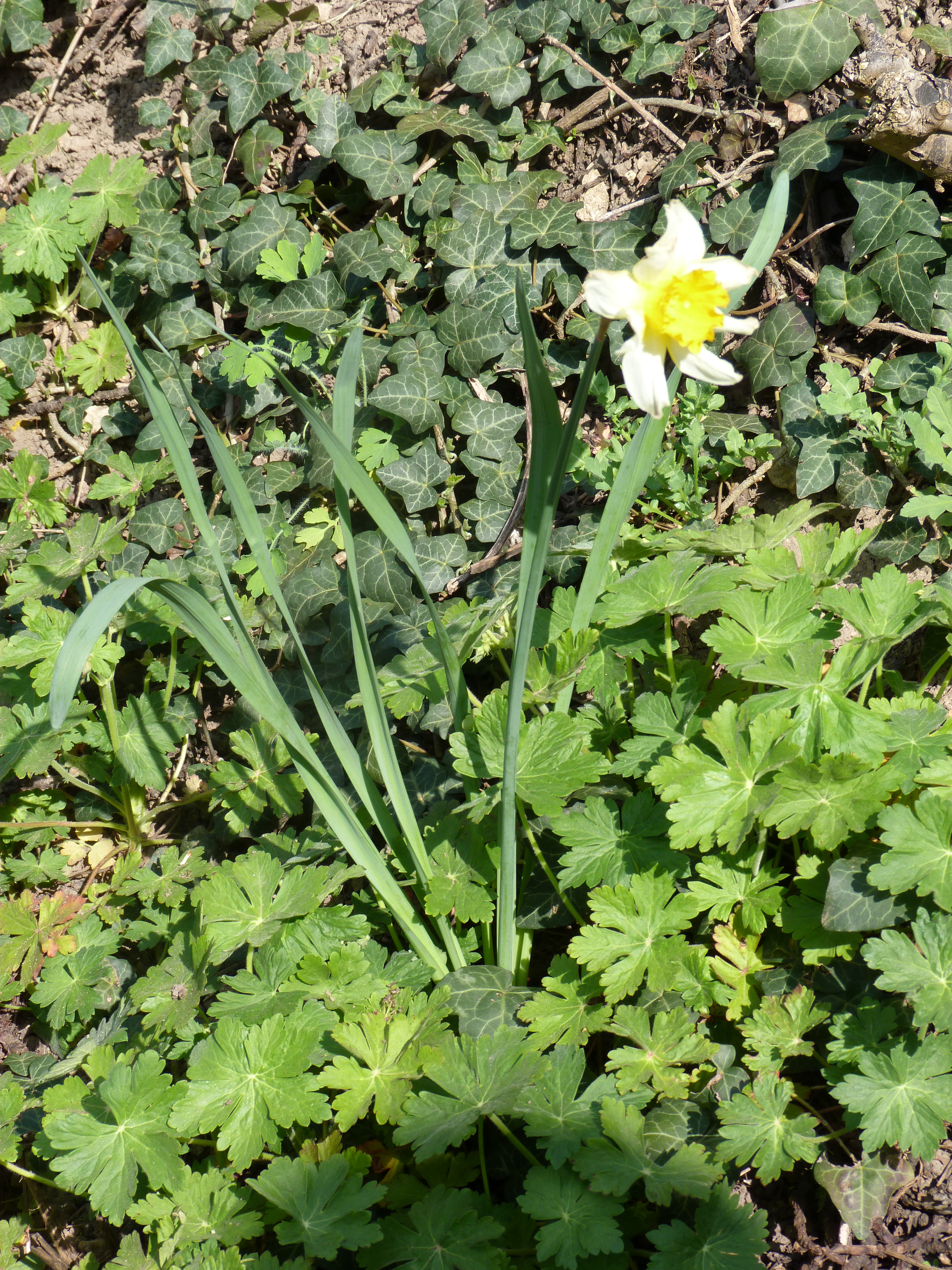 A felvétel 2013. április 23-án készült Budán. A sashegyi természetvédelmi területhez közeli kert. ©© Derzsi Elekes Andor, Budapest, 2015, Published in the Metapolisz DVD line. You are authorised to use this photo under Creative Commons – even for commercial, for profit purposes. The vid must be attributed to Derzsi Elekes Andor. All of the photos and vids in the Metapolisz DVD line are under Creative Commons and can be used even for commercial – for profit – purposes. Recommended Citation Derzsi Elekes Andor: Metapolisz DVD line